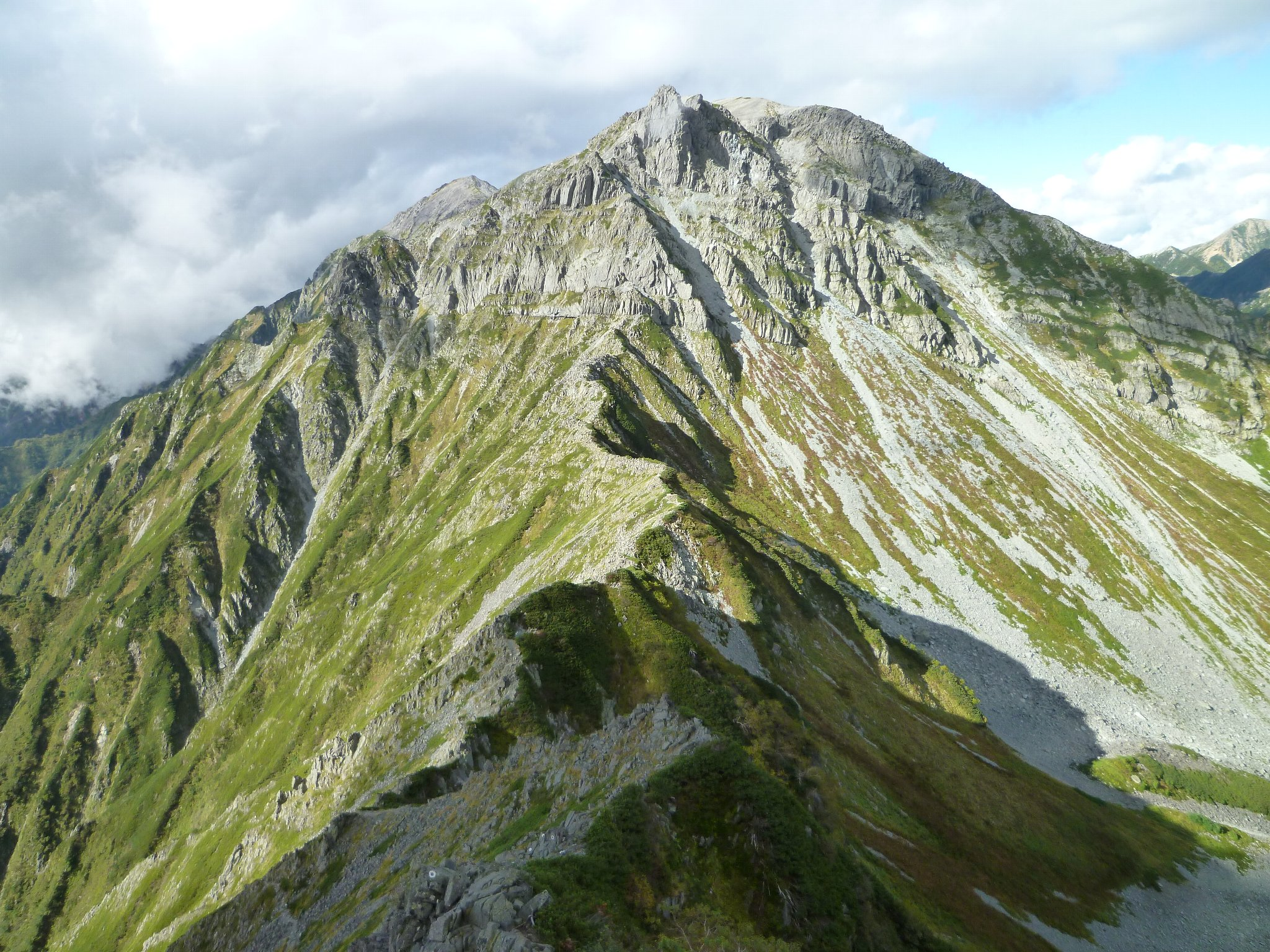 大キレットからの南岳。